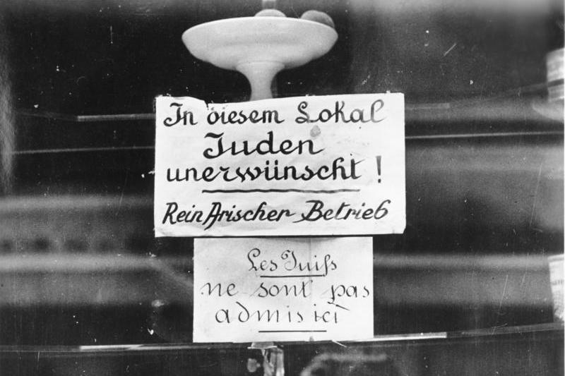 Plakat im Fenster eines französischen Restaurants ADN-ZB/Archiv Frankreich unter der faschistischen deutschen Besatzung, "In diesem Lokal - Juden unerwünscht! Rein arischer Betrieb" ["Les Juifs ne sont pas admis ici"], so lautet der Anschlag im Fenster eines Pariser Lokals in der Rue de Choiseul. Von den faschistischen Besatzern wurde auch der hemmungslose Antisemitismus aus Nazi-Deutschland nach Frankreich exportiert. 8087-40